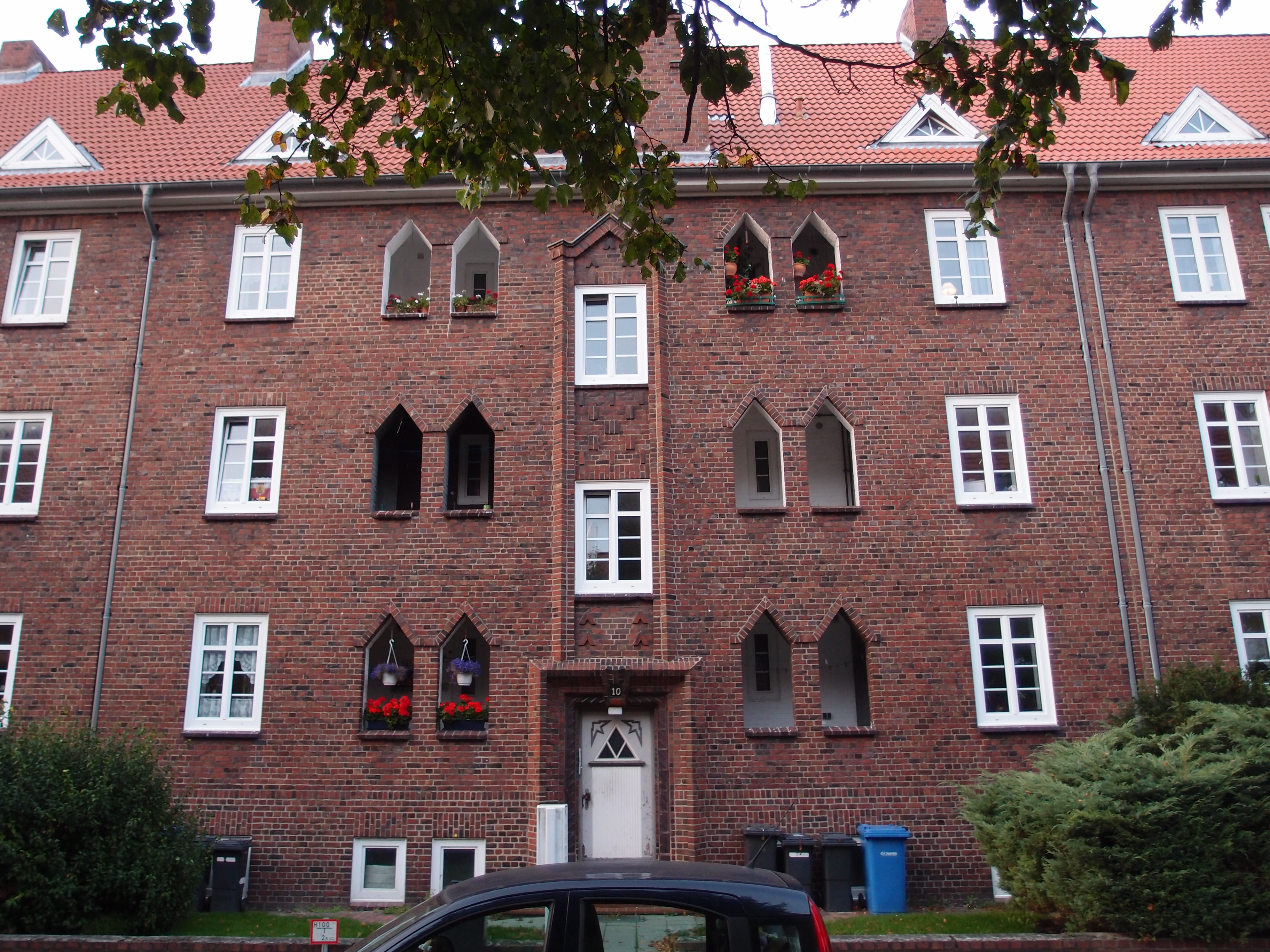 Cuxhaven, Gorch-Fock-Straße 10, Straßenansicht. Ensemble.